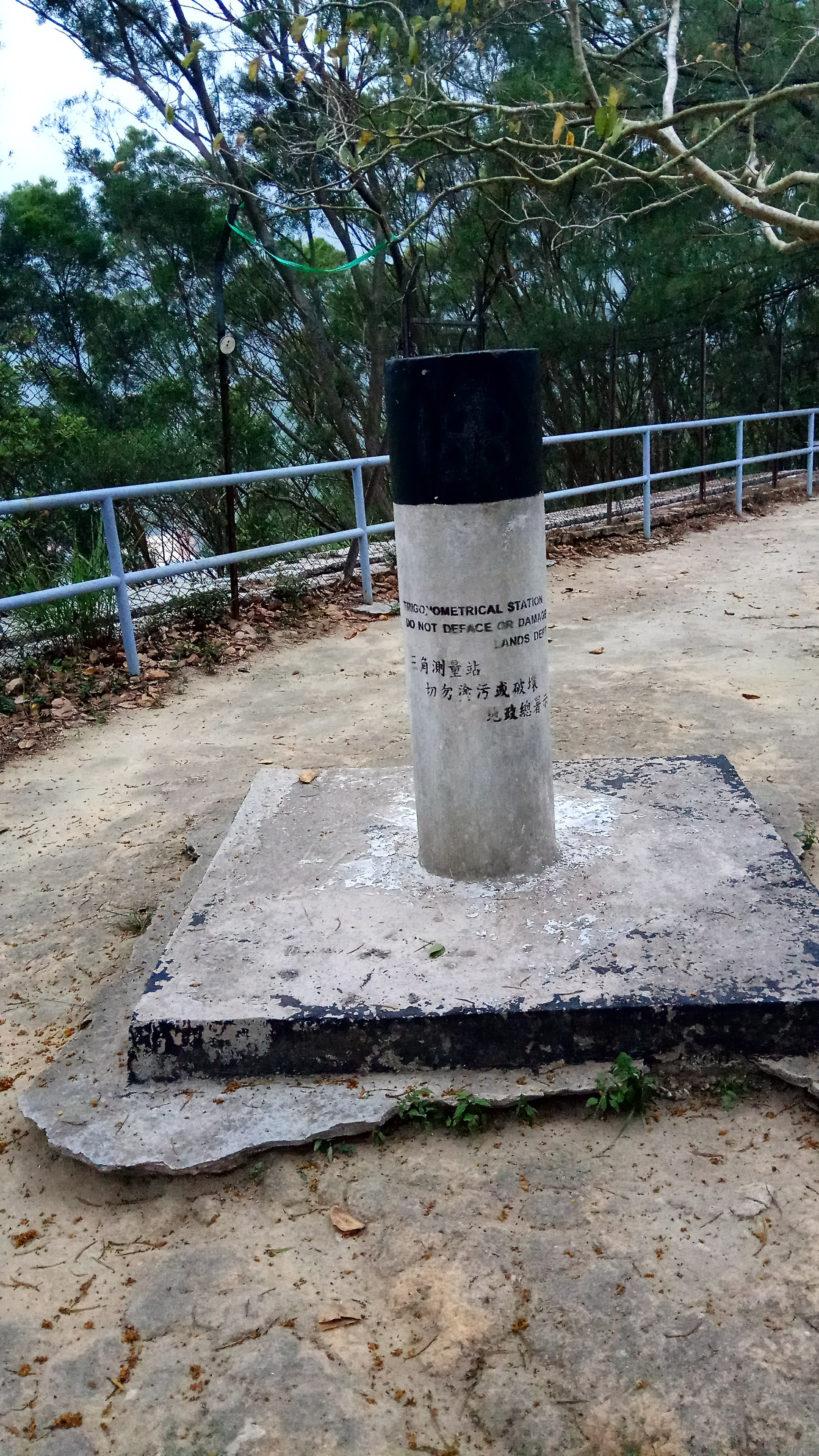 中文（香港）: 平山標高柱